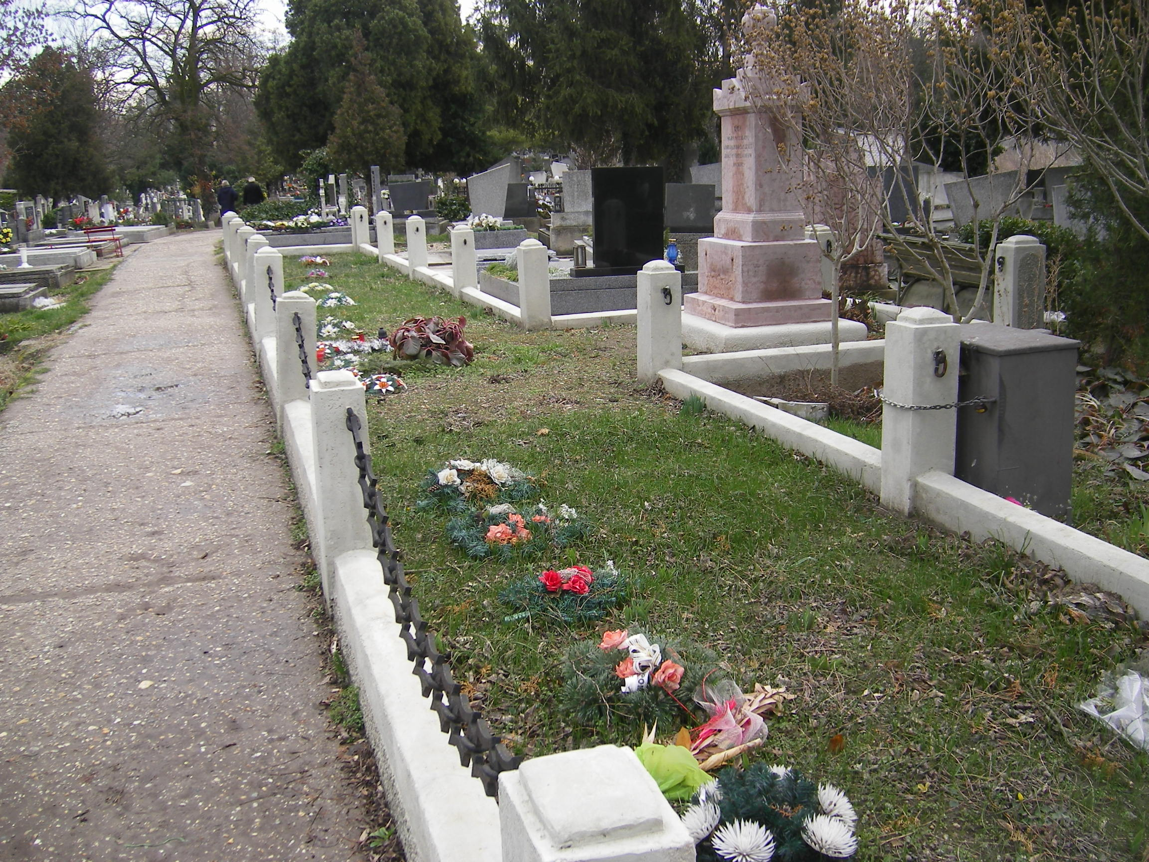 Az 1919. május 1-én elesett munkások sírja a komáromi katolikus temetőben.